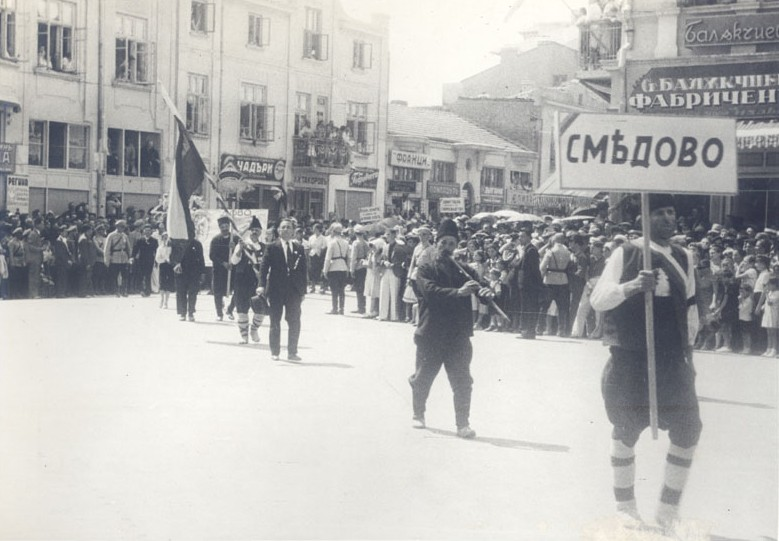 4-ти селскостопански културен и национален събор, 28 - 29 август 1938 г., гр. Варна. Парад на участниците в събора по ул. Княз Борис І. На преден план са представителите на с. Смядово (дн. град), Преславска околия.